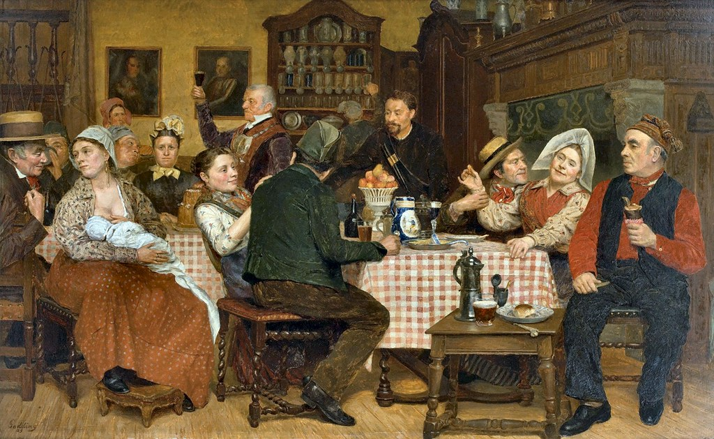 Familiebanket